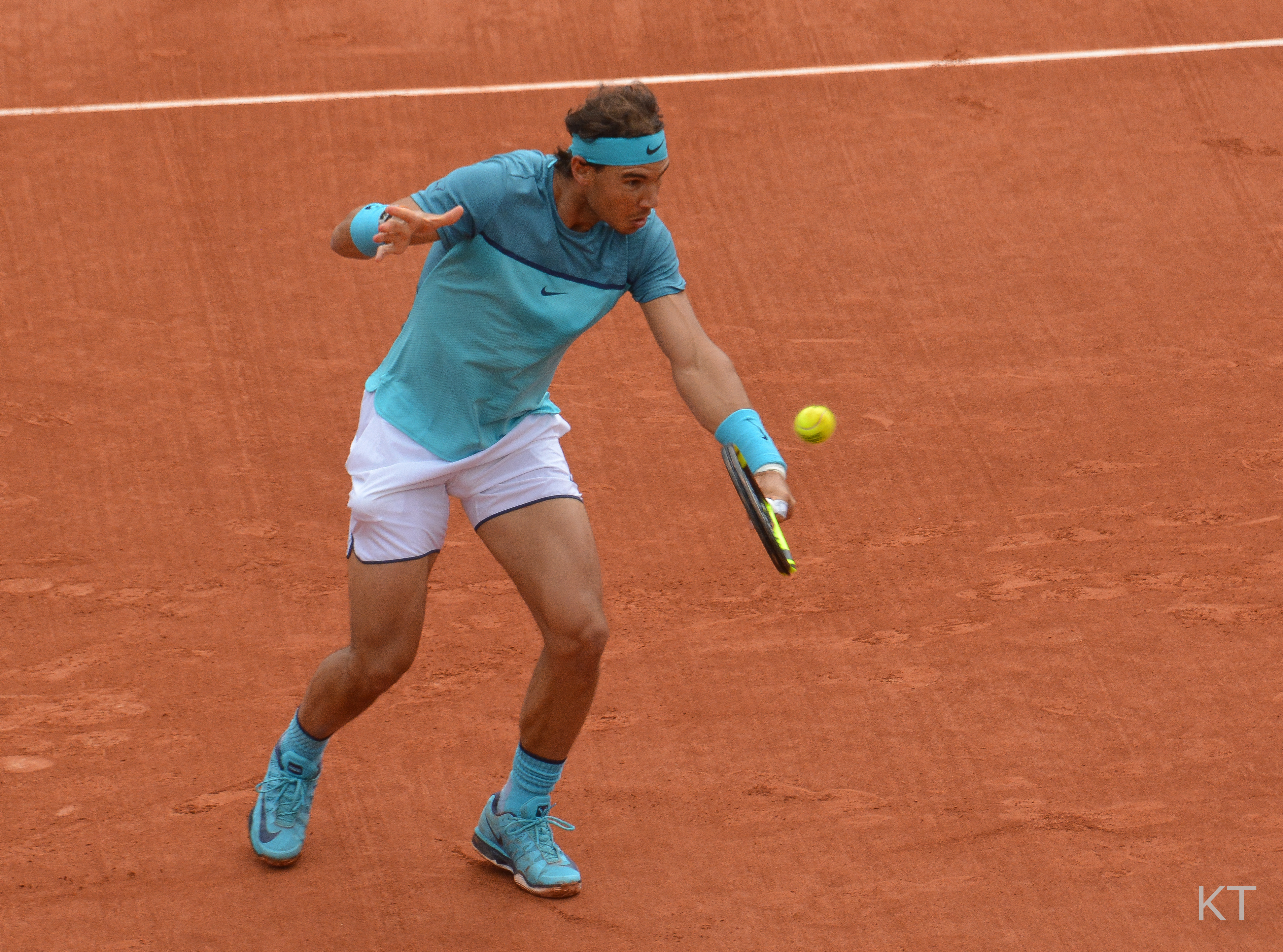 Roland Garros 2016